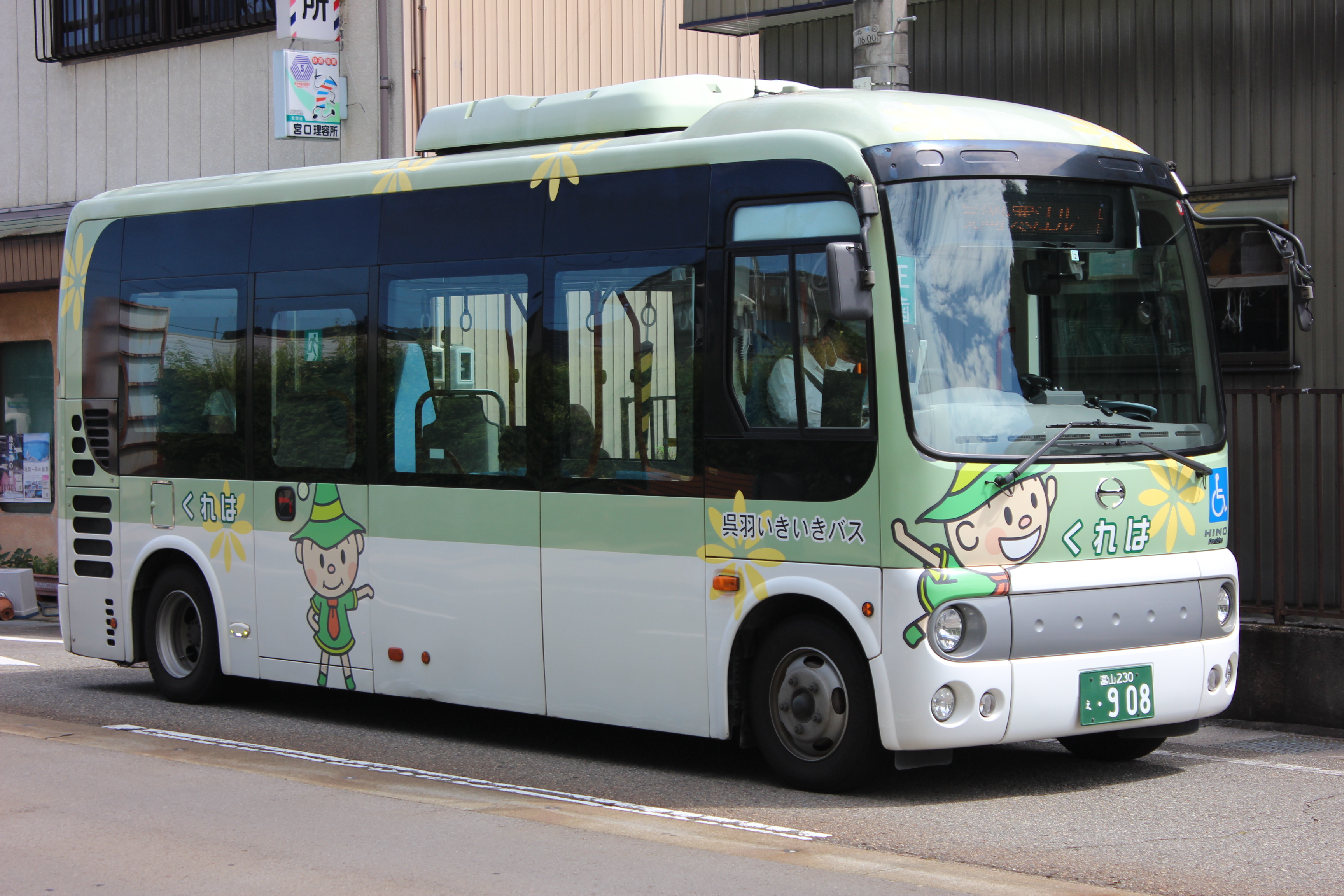 富山県富山市の呉羽いきいきバス